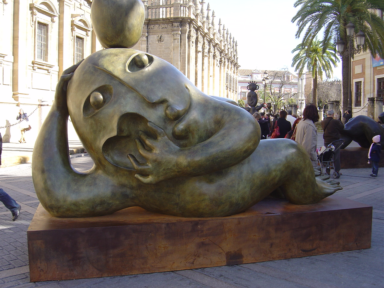 Imagen de la Plaza del Triunfo de Sevilla, donde puede verse la fachada de la Catedral de Sevilla, la del Archivo de Indias y una escultura de Juan Ripollés